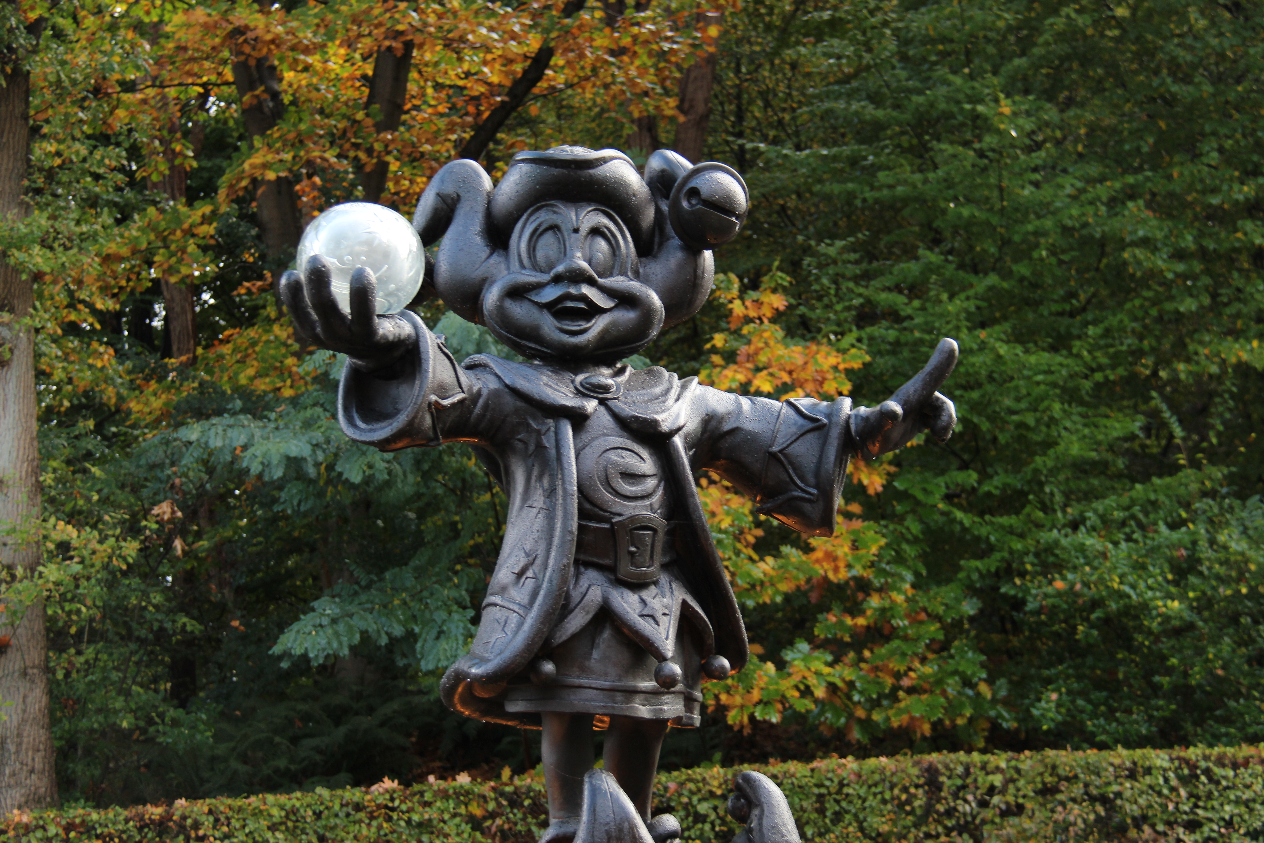 Pardoesbeeld